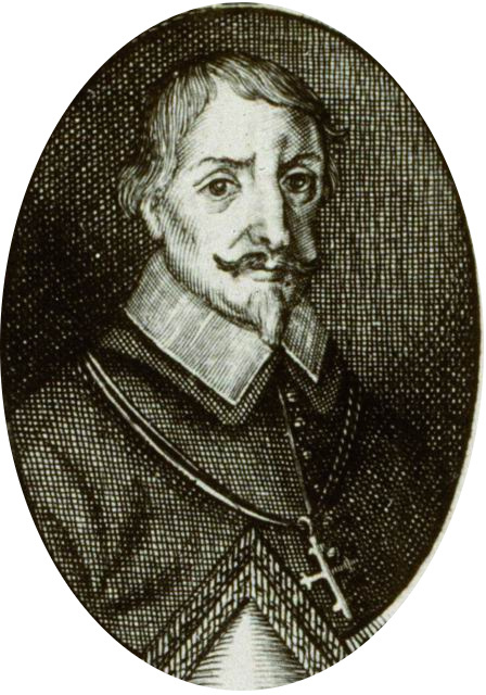 Janez Tavčar